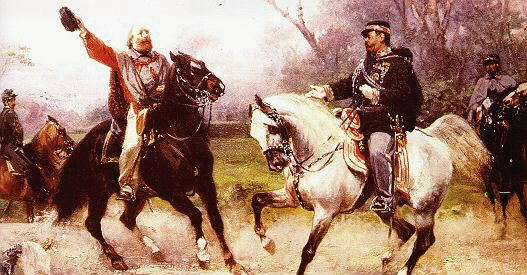 Rencontre entre Garibaldi et Vittorio Emanuele II à Vairano Patenora.